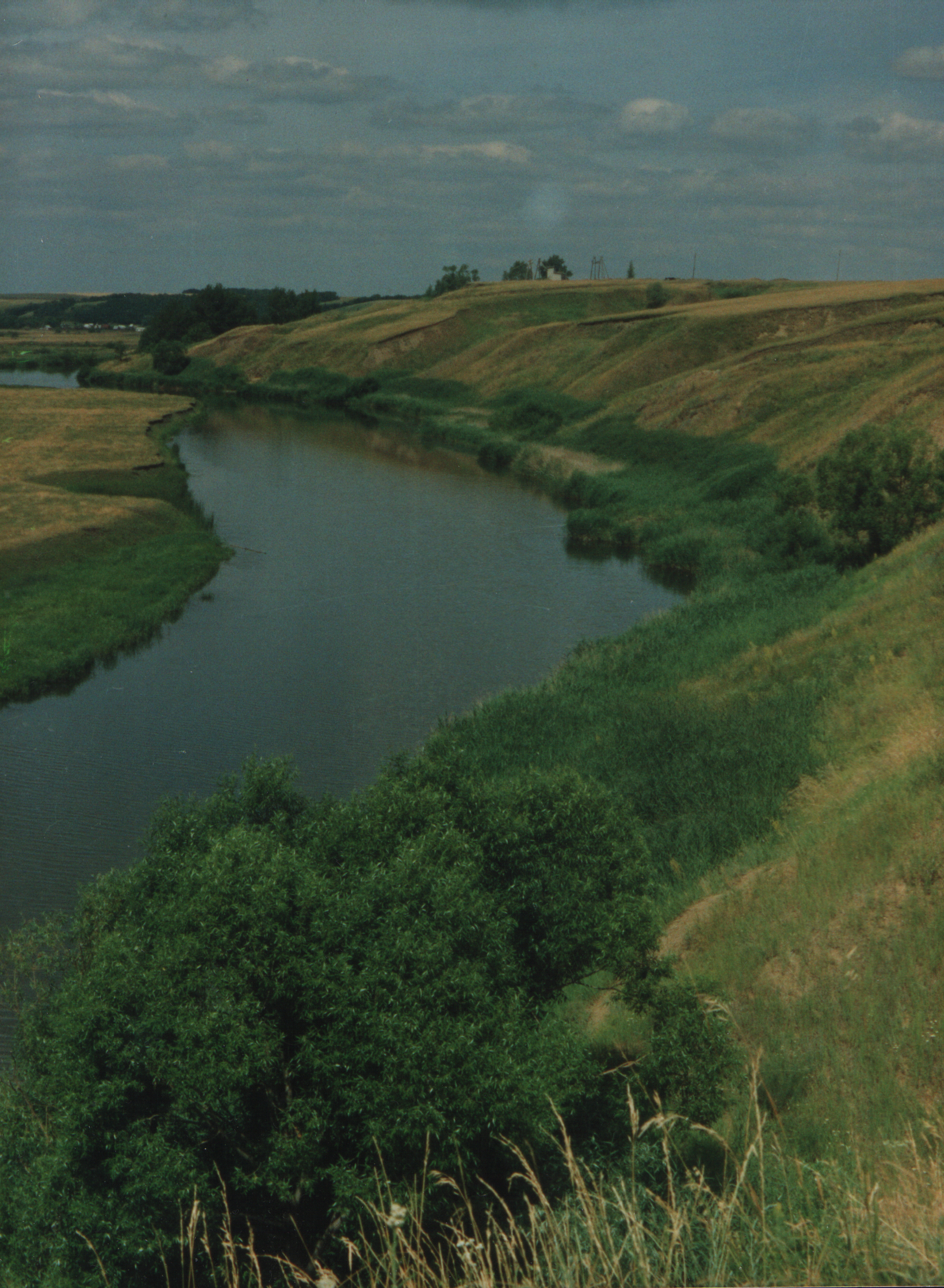 Река Изнаир близ села Шило-Голицыно (Ртищевский район)